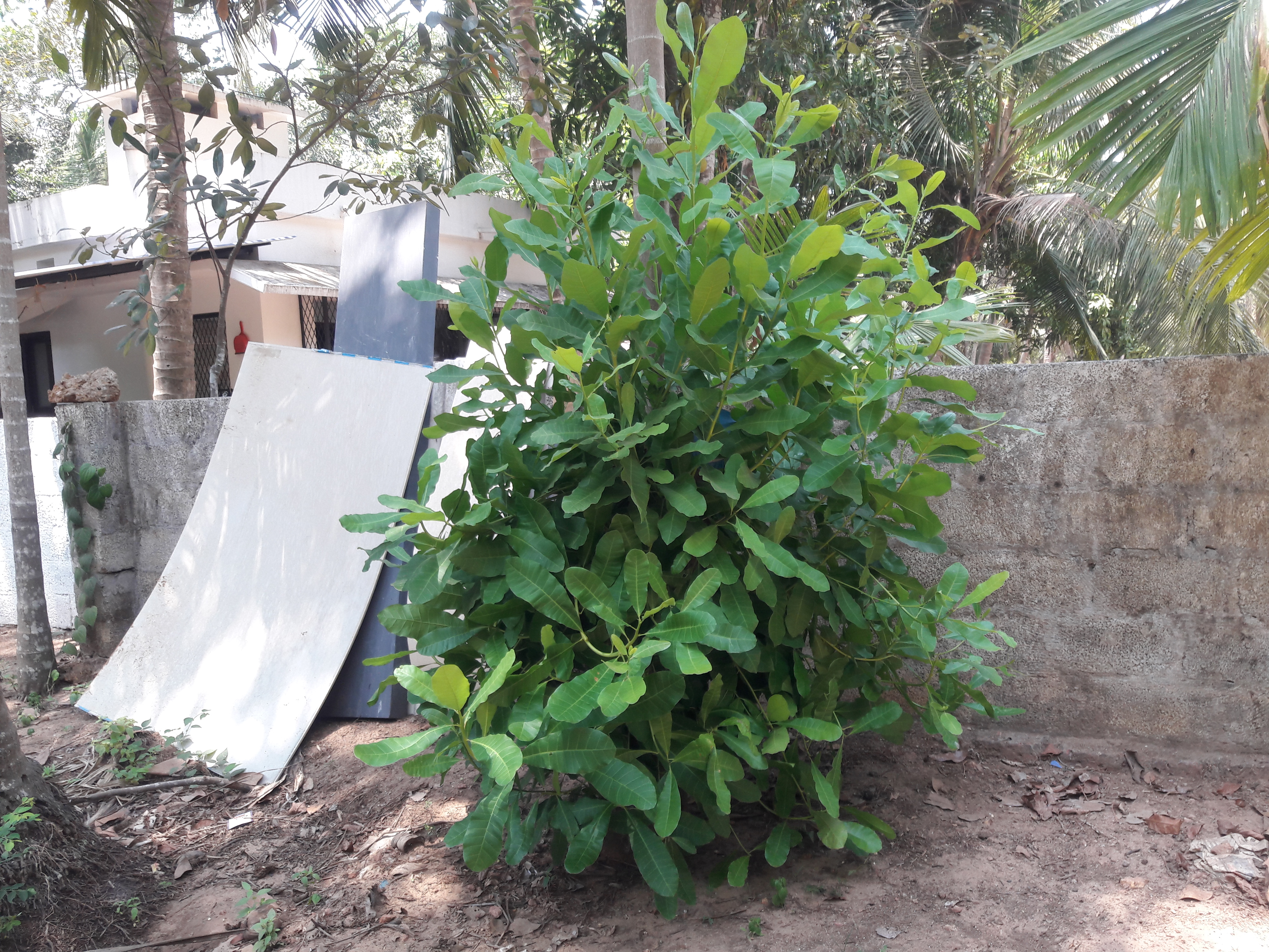 മരങ്ങളിലെ പുനര്‍ യൗവന പ്രക്രിയ ചെയ്ത ശേഷം ഇലകള്‍ തളിര്‍ത്ത് വരുന്ന ഒരു കശുമാവ് ശാസ്ത്രീയനാമം Anacardium occidentale കുടുംബം Anacardiaceae.